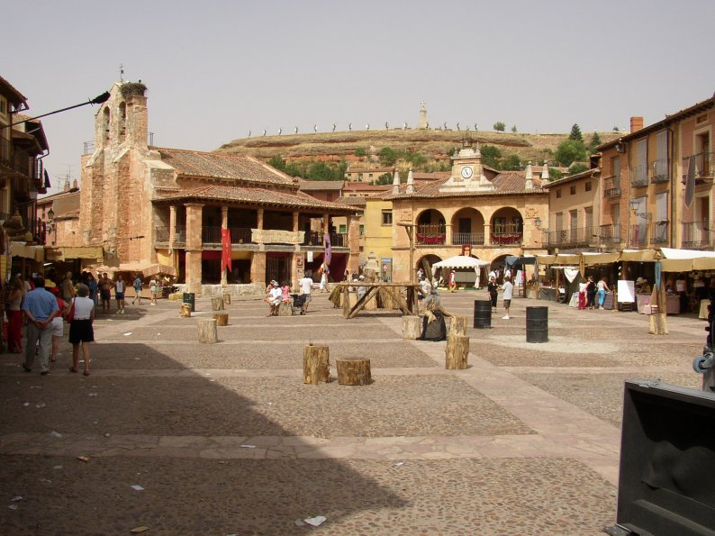 Segovia. (Castilla-León. España) Ayllón. Plaza Mayor con mercado "medieval". Fotografía realizada en agosto de 2004 por el autor.User:Pelayo2